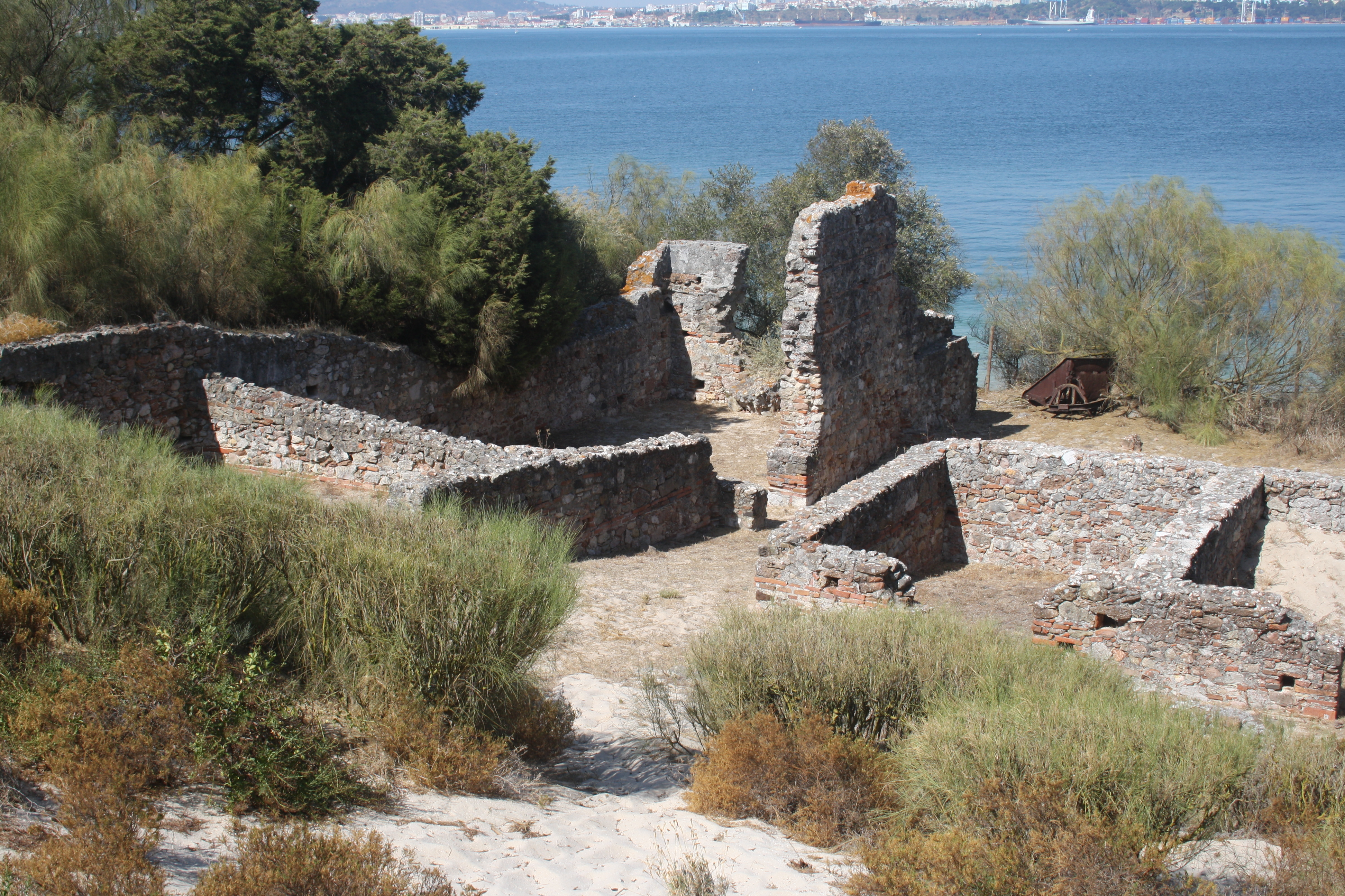 Resten van woningen